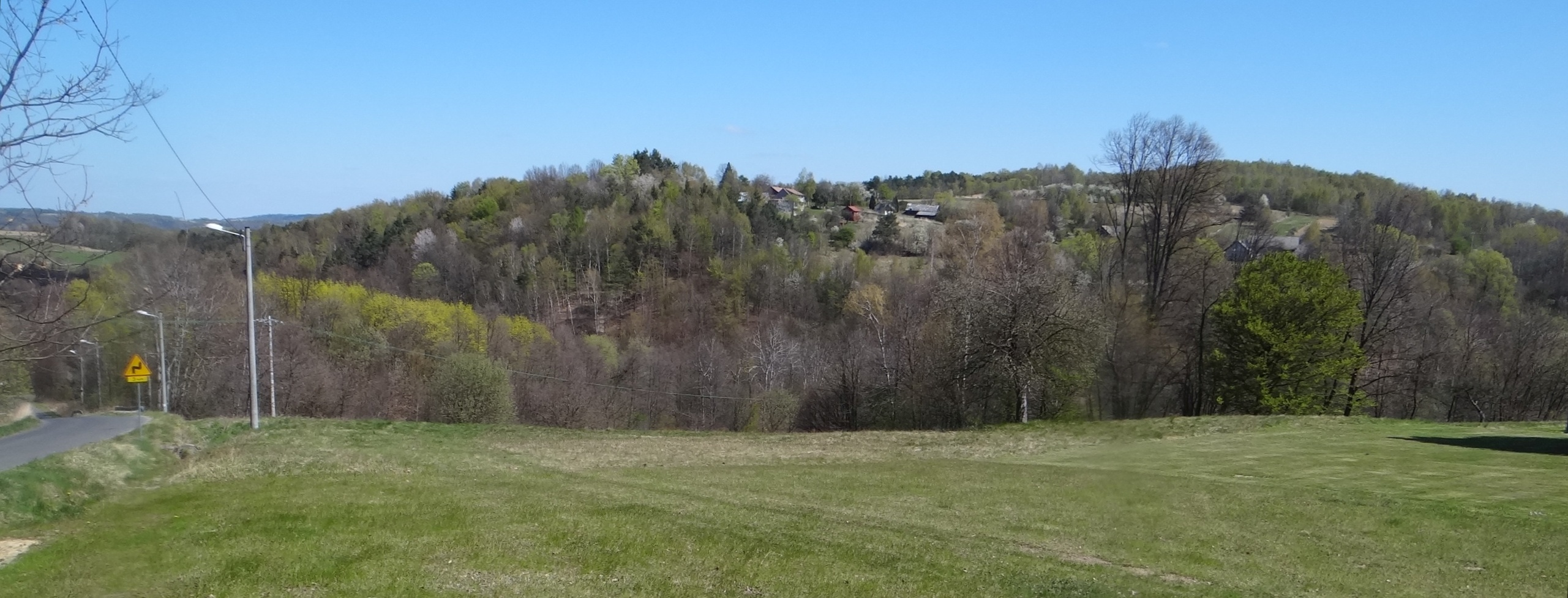 Kobyla Góra. Widok spod remizy w Borównej